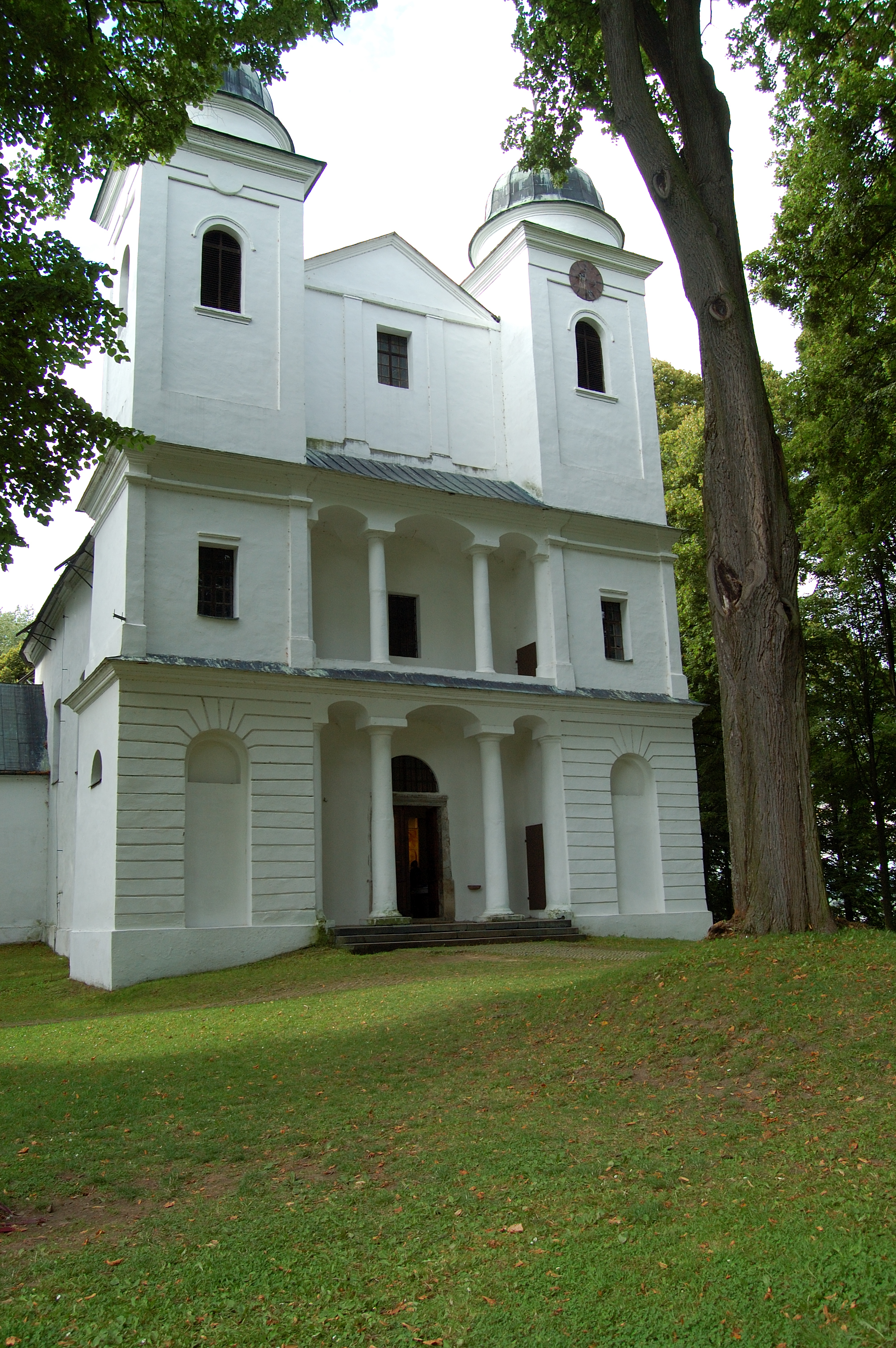 Kostol na Slanickom ostrove, Oravská priehrada